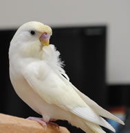 巻き毛セキセイインコ